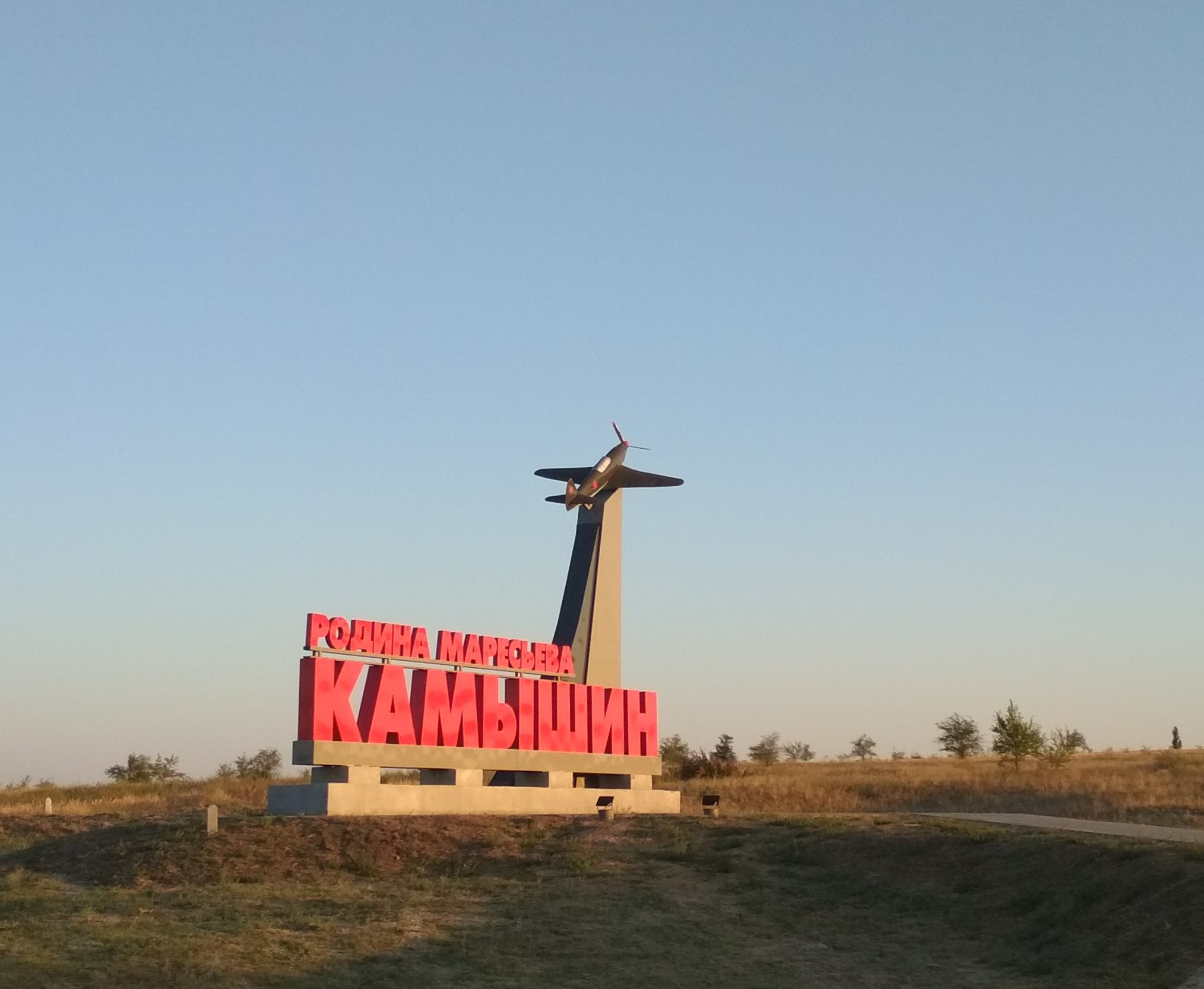 Стелла у въезда в г Камышин с указанием того, что в Камышине родился Герой Советского Союза Алексей Маресьев.